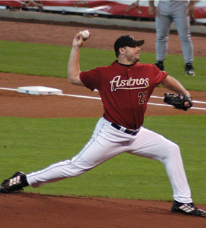 Roger Clemens